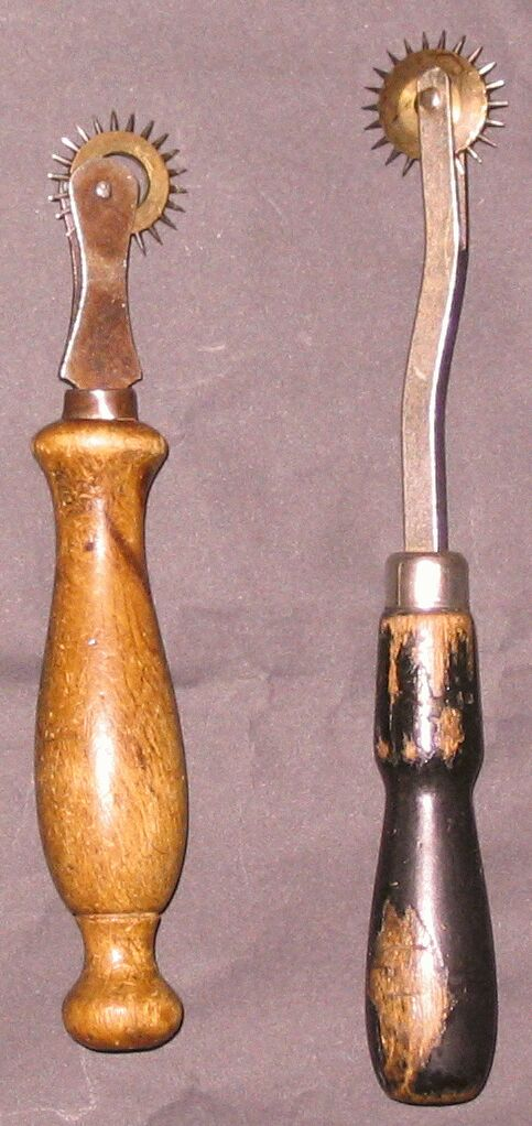 Furrier`s pliers. Handwerkszeug des Kuerschners: Kopierräder eines Kürschners. Deutschland. In Pelzmodelle Kuhn, Düsseldorf